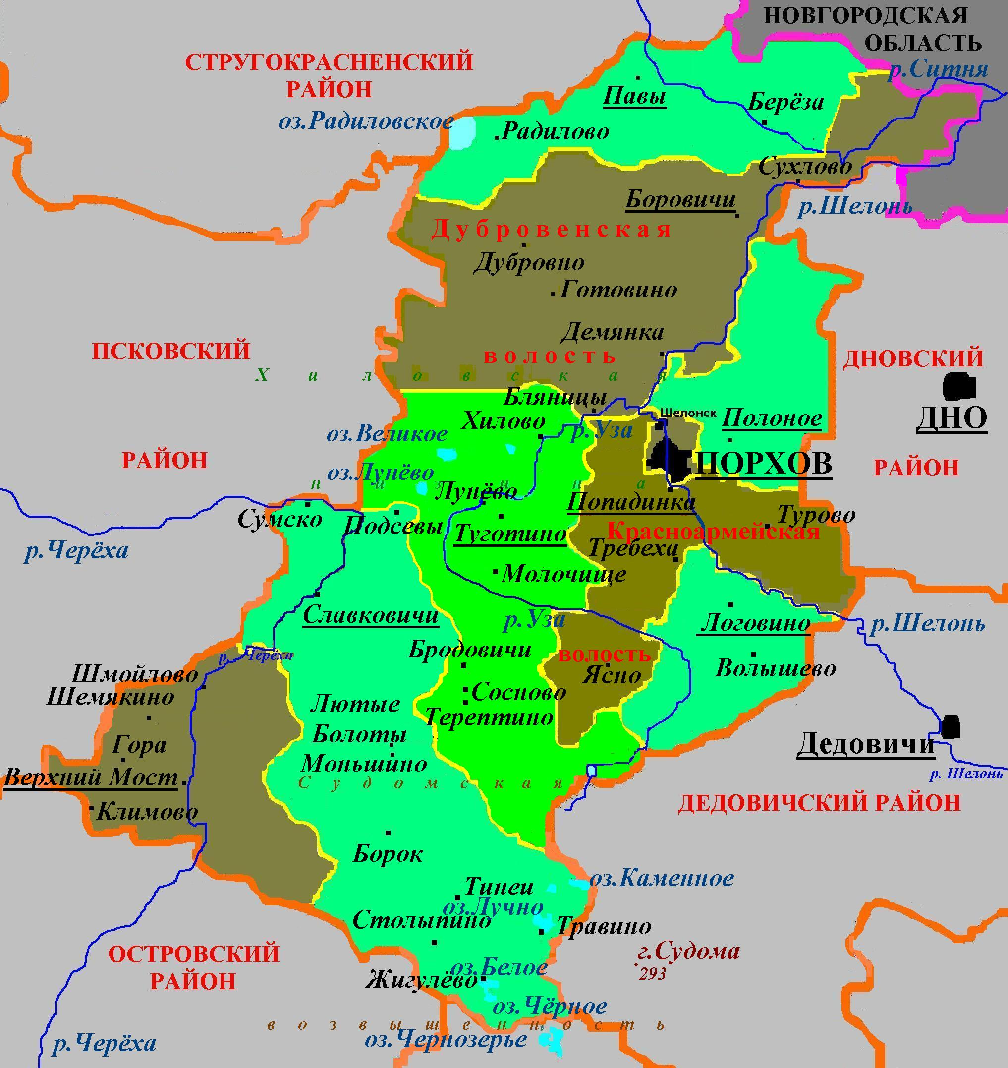 Административное деление Порховского района по плану к 2011 году (примерное)